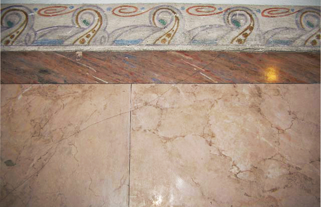 Trappuppgång i fastighet Målaren 3, Birger Jarls gatan 83, Stockholm. Byggår 1916-18, arkitekt M. Lundstedt, byggherre J.A. Liljeroth & G. Eriksson och byggmästare G.A. Lundberg. De marmorerade partierna är utförda i stucco lustro. Väggar och tak har varit dekorerade med kalkmåleri på torr puts, al secco som ger en matt yta vilket kontrasterat väl mot den blanka bröstningen av stucco lustro.